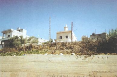 مسجد الشيخ علي بن عبد العالي الميسي في الحي الشرقي من بلدة ميس الجبل في جنوب لبنان (جبل عامل)